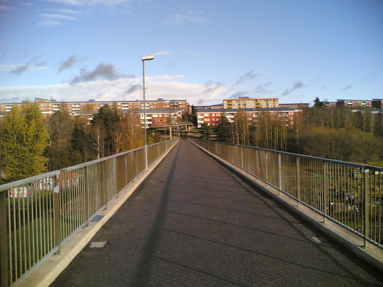 Hjulsta suburb in Stockholm.